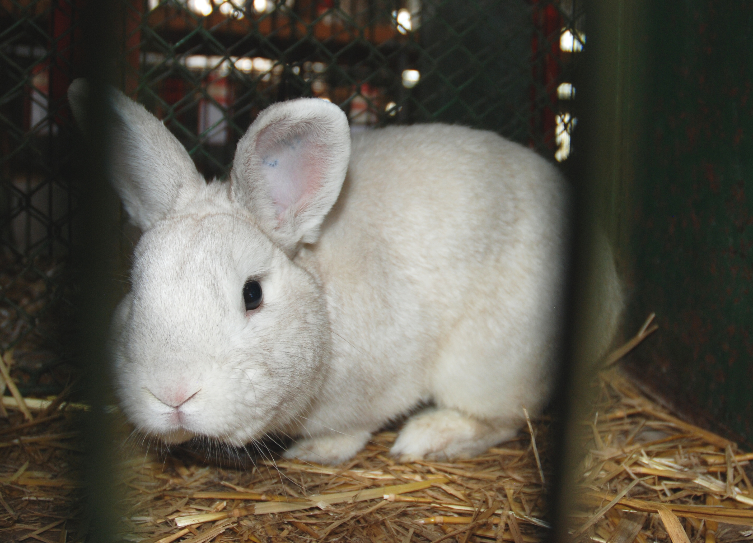 český černopesíkatý králík